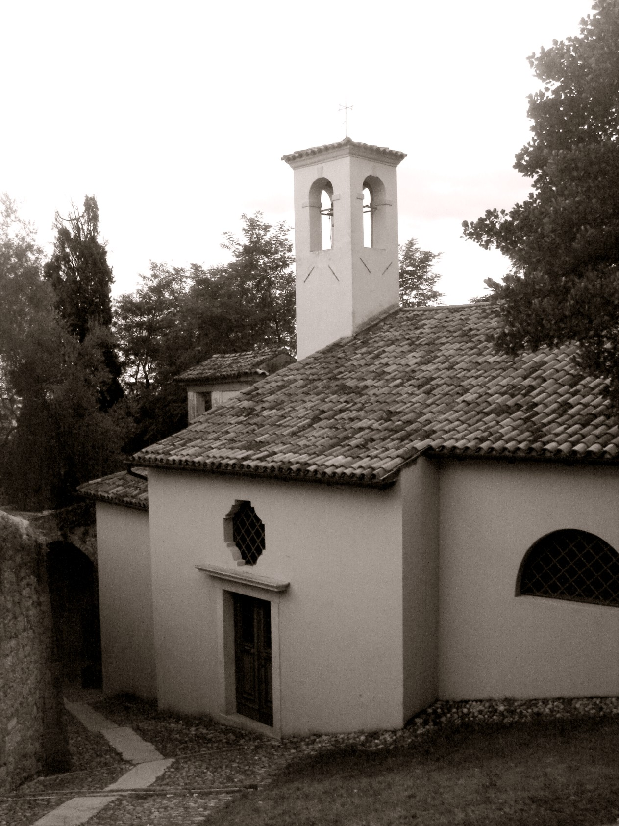 Conegliano: Madonna della Neve, oratorio lungo la cinta muraria trecentesca.